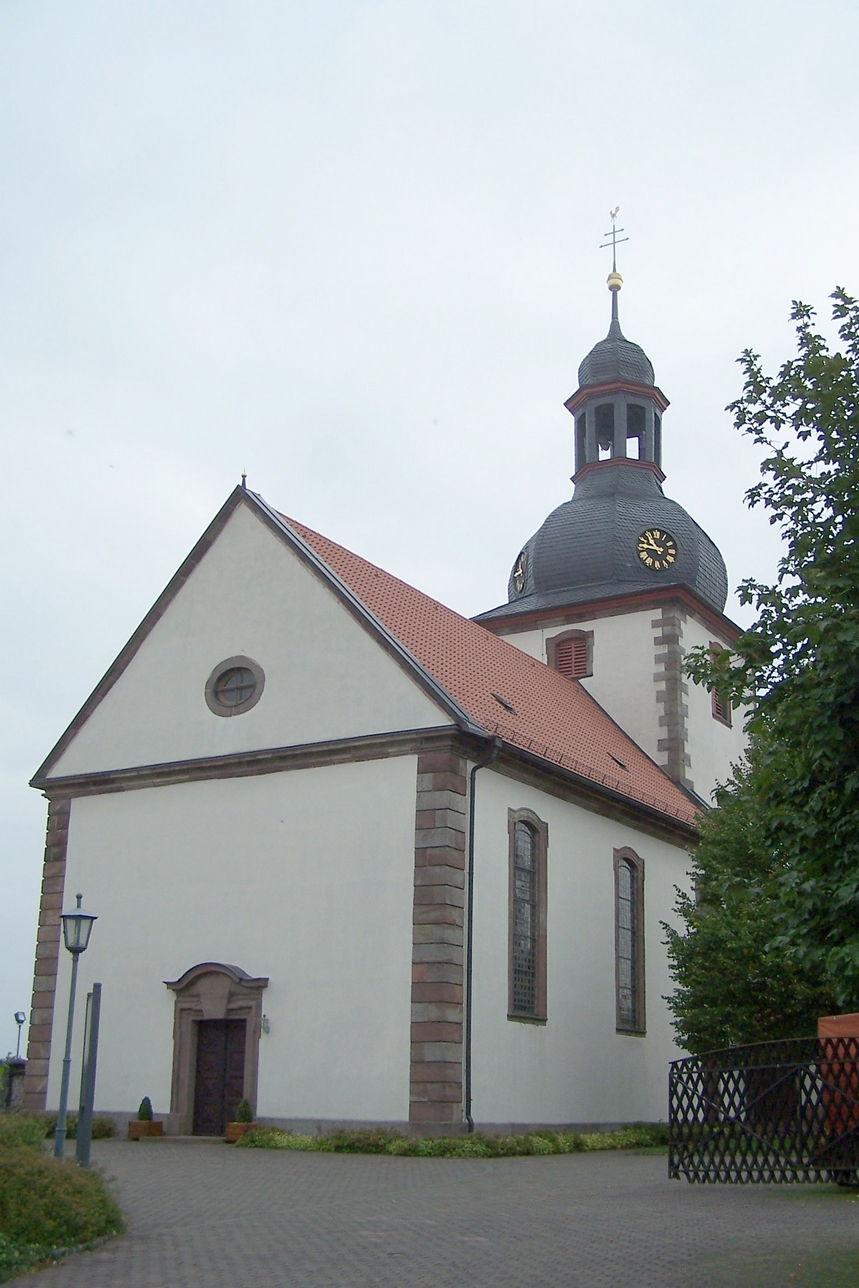 Die katholische Pfarrkirche St.-Cyriakus in Spahl.